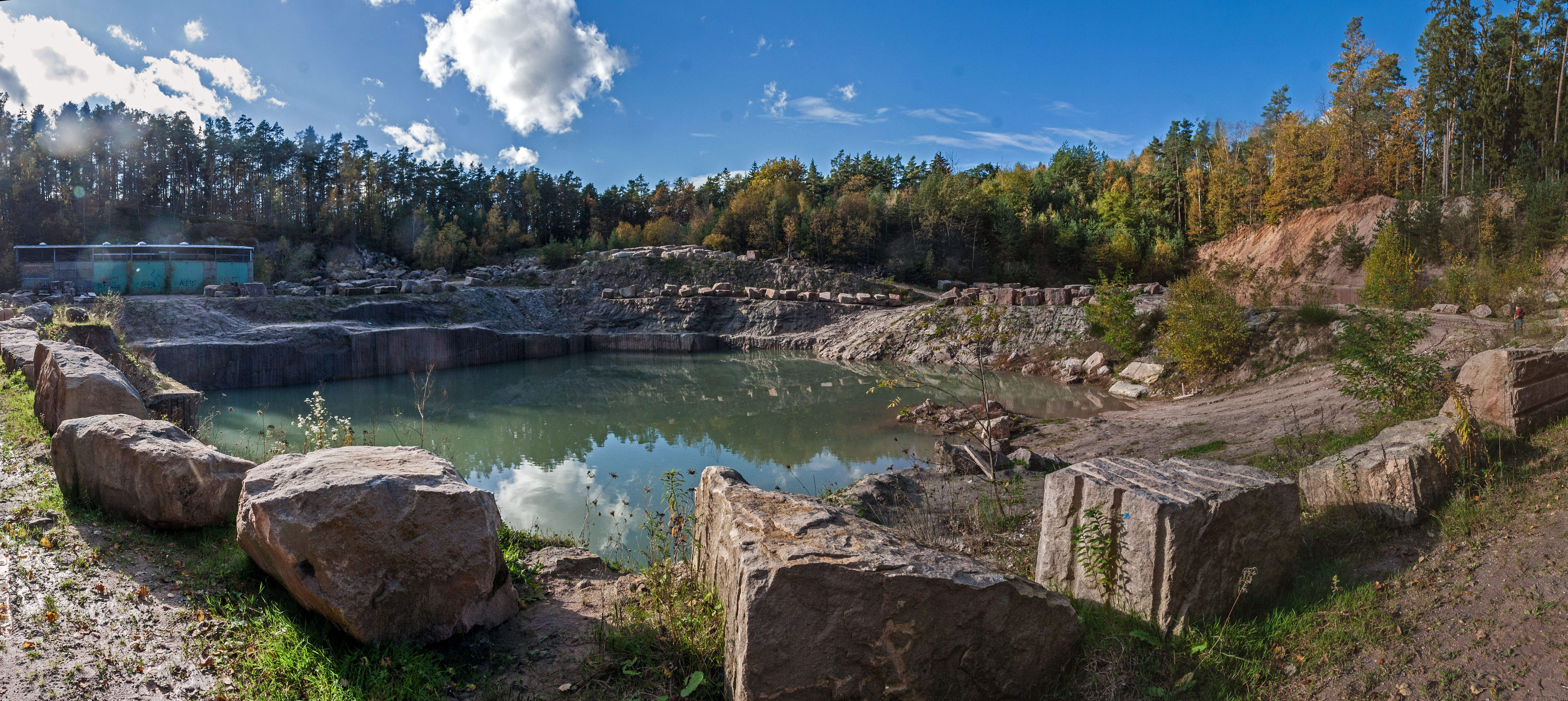 Steinbruch Worzeldorf